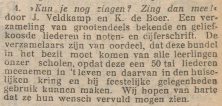 De eerste recensie over het liedboek "Kun je nog zingen, zing dan mee", verschenen in Nieuwsblad van het Noorden (28-10-1906).